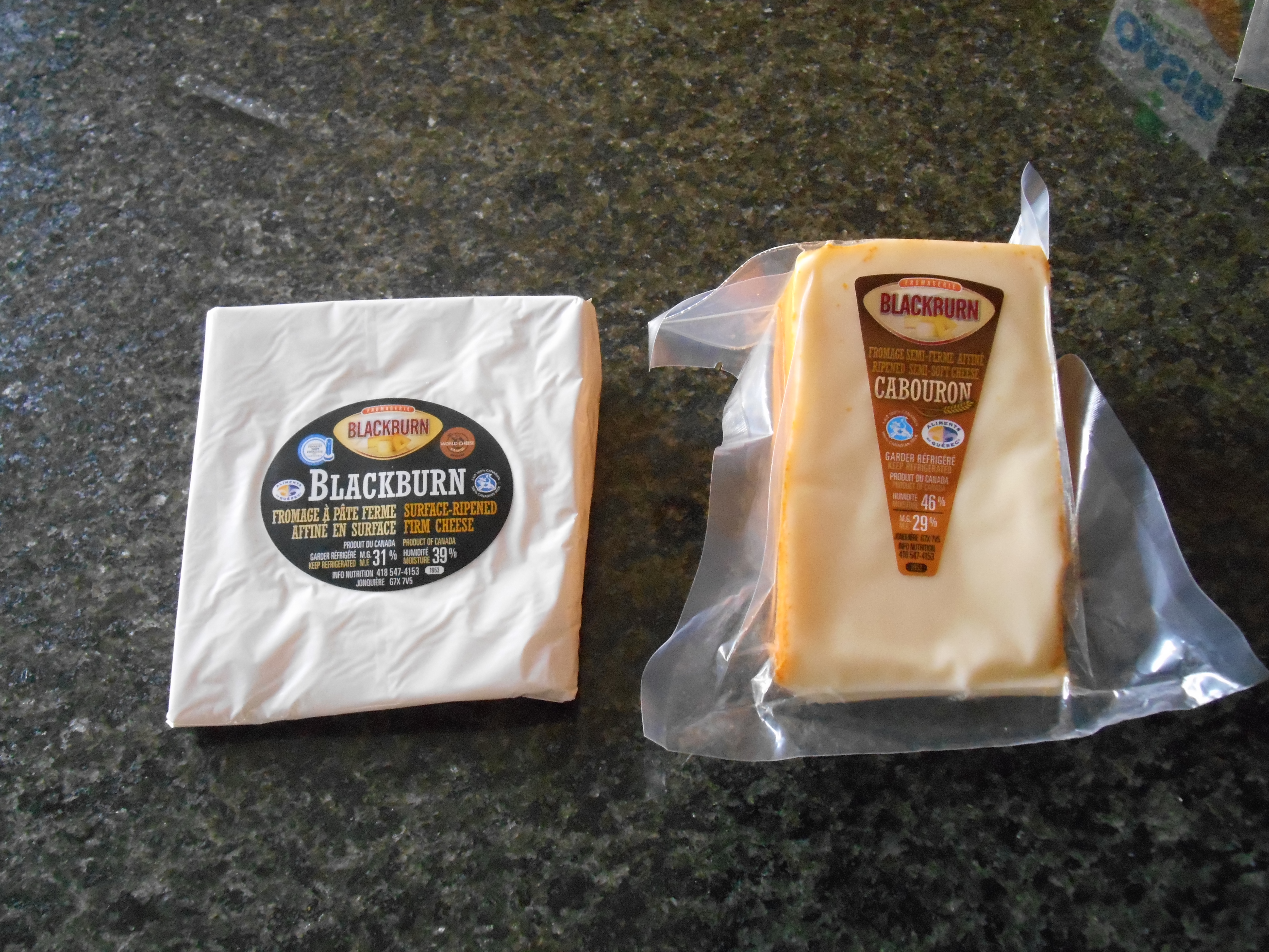 Le Blackburn et le Cabouron sont des fromages fabriqués au Saguenay–Lac-Saint-Jean, Québec, Canada